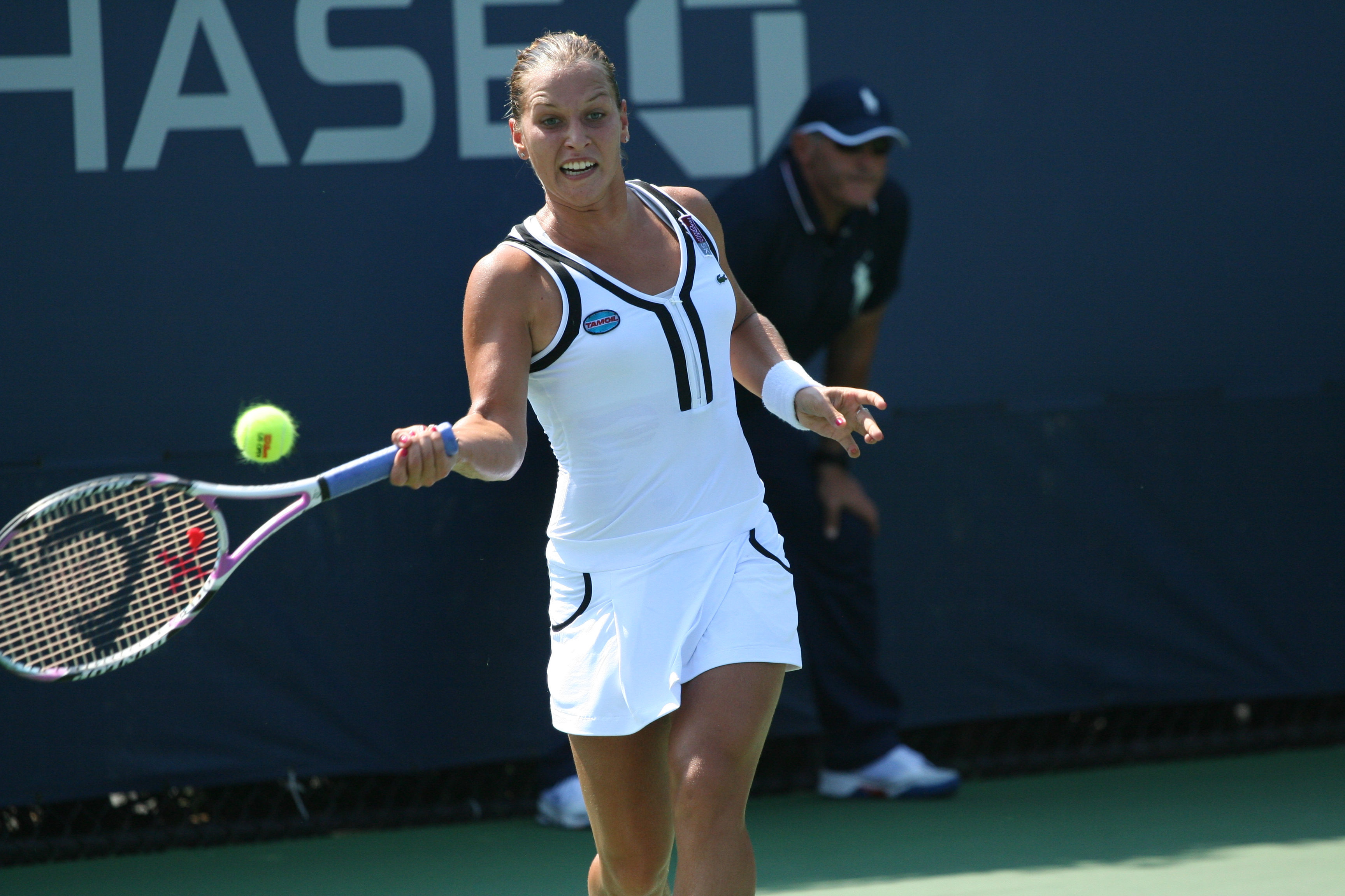 Dominika Cibulková at the 2010 US Open